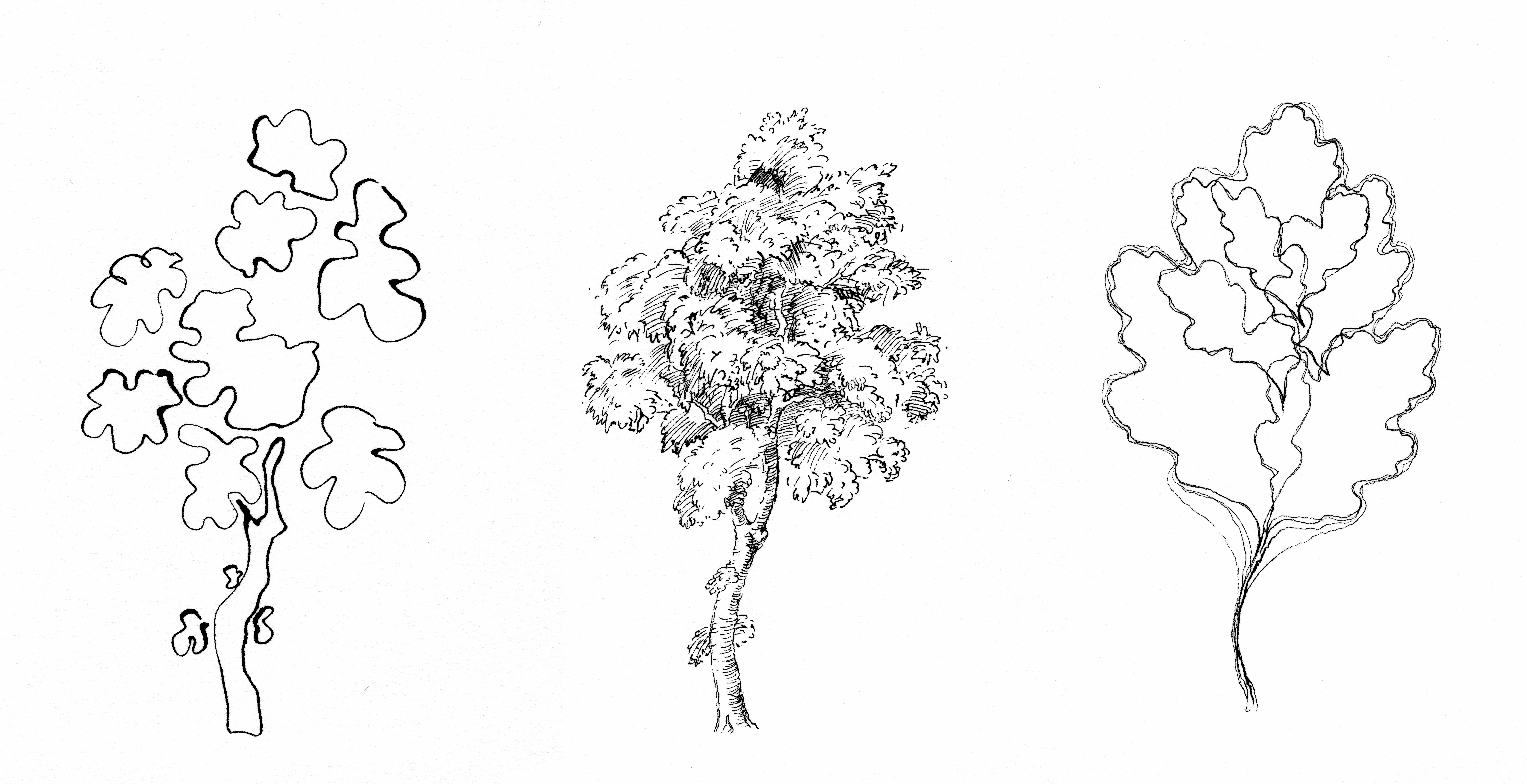 Emmanuel Fournier, Livre "Sur la lecture", chapitre I, éditions Corduriès, 1989, 2007